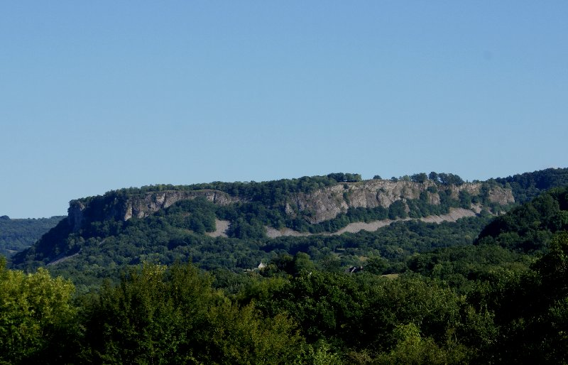 Oppidum naturel de Chastel-Marlhac dans le Cantal France) canton de Saignes